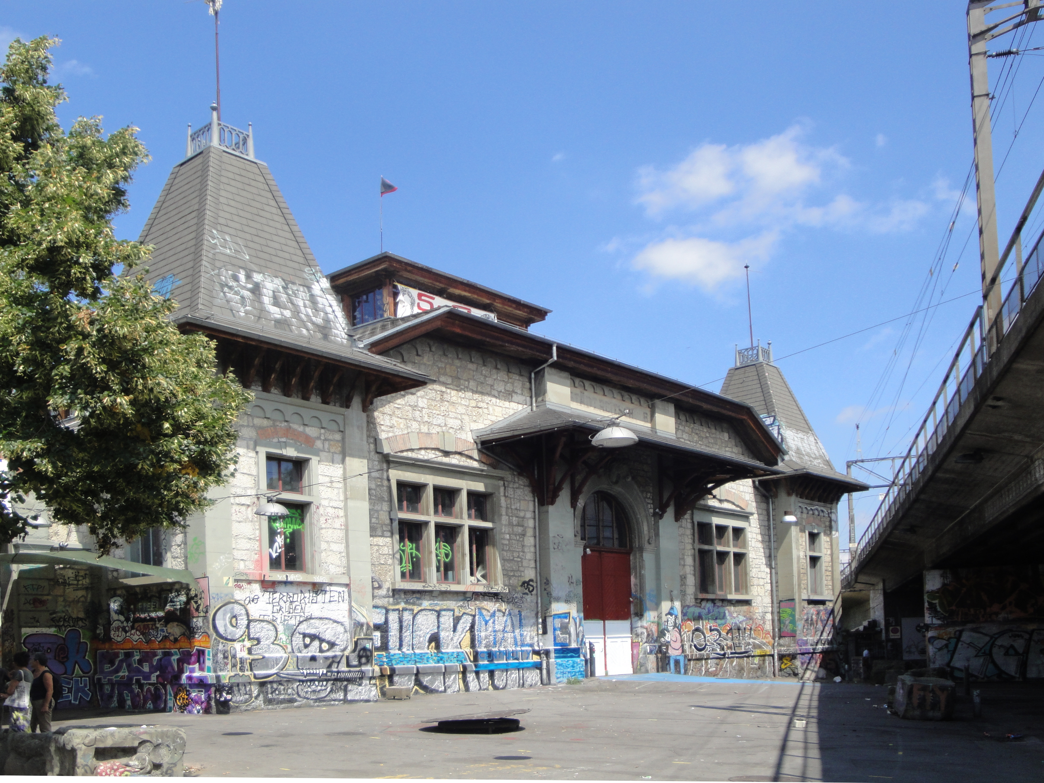 Bern, Kulturzentrum Reithalle